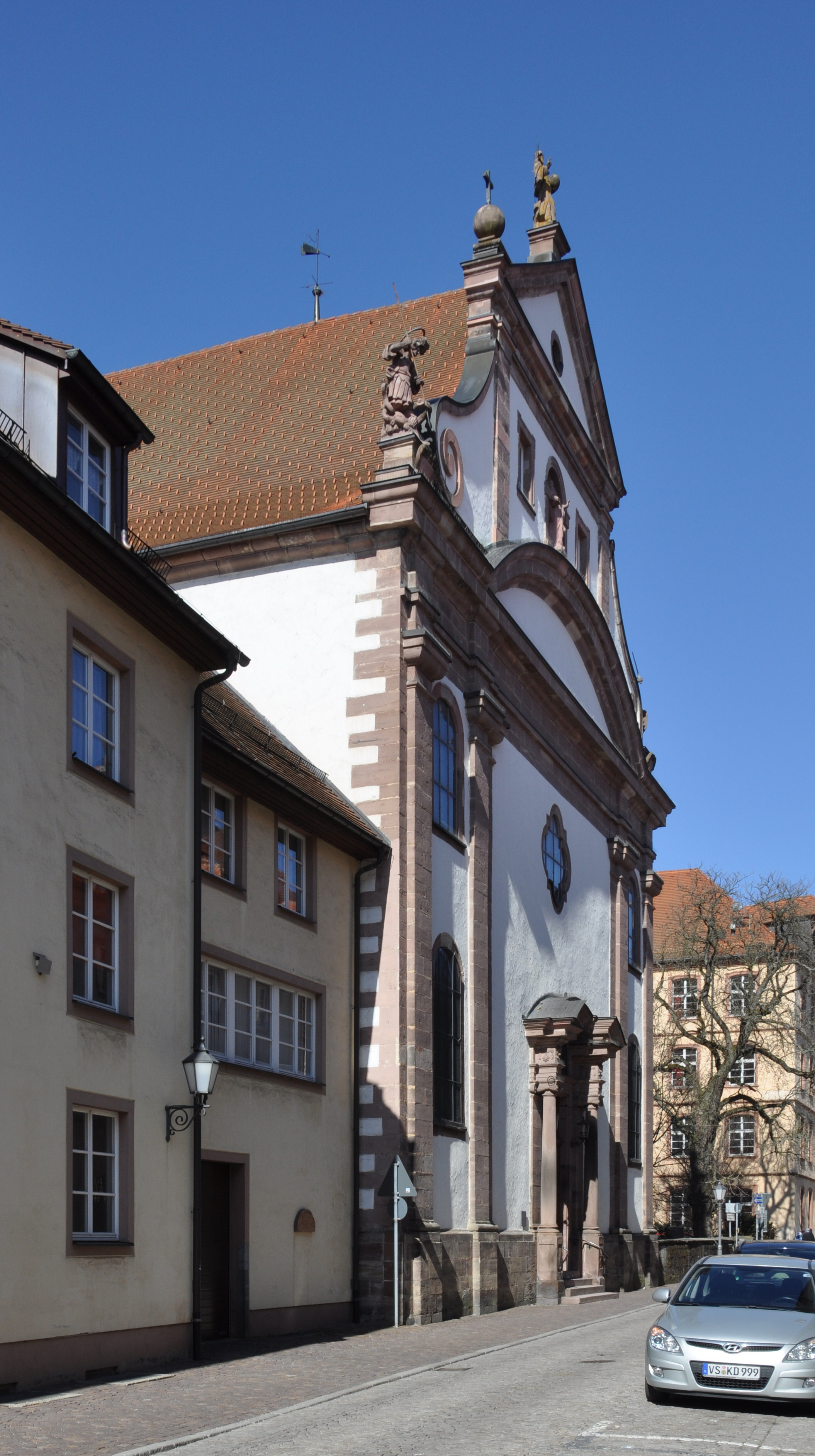 Villingen-Schwenningen, Stadtbezirk Villingen Benediktinerkirche, Fassade zur Schulgasse